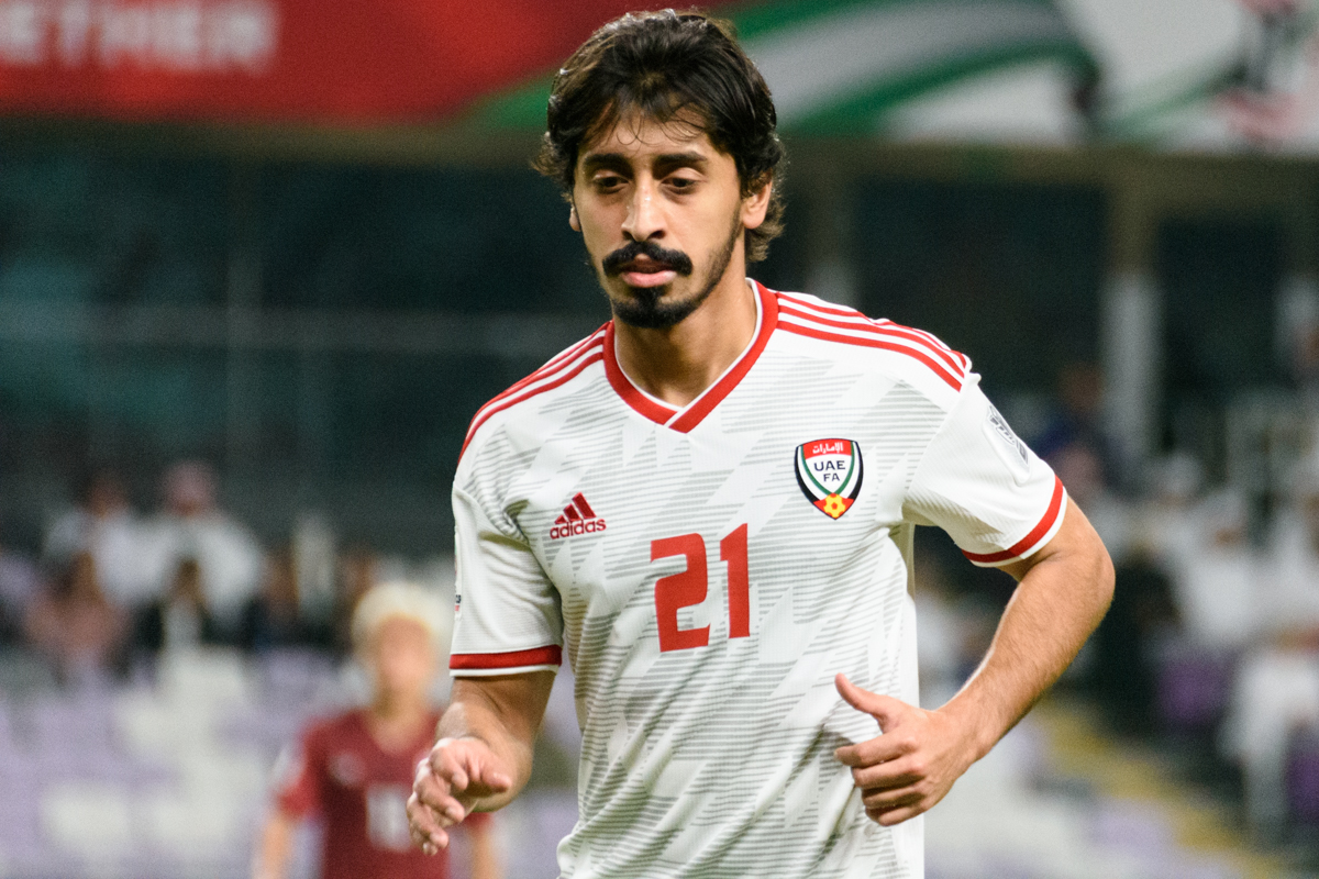 Khalfan Mubarak at the Asian Cup 2019